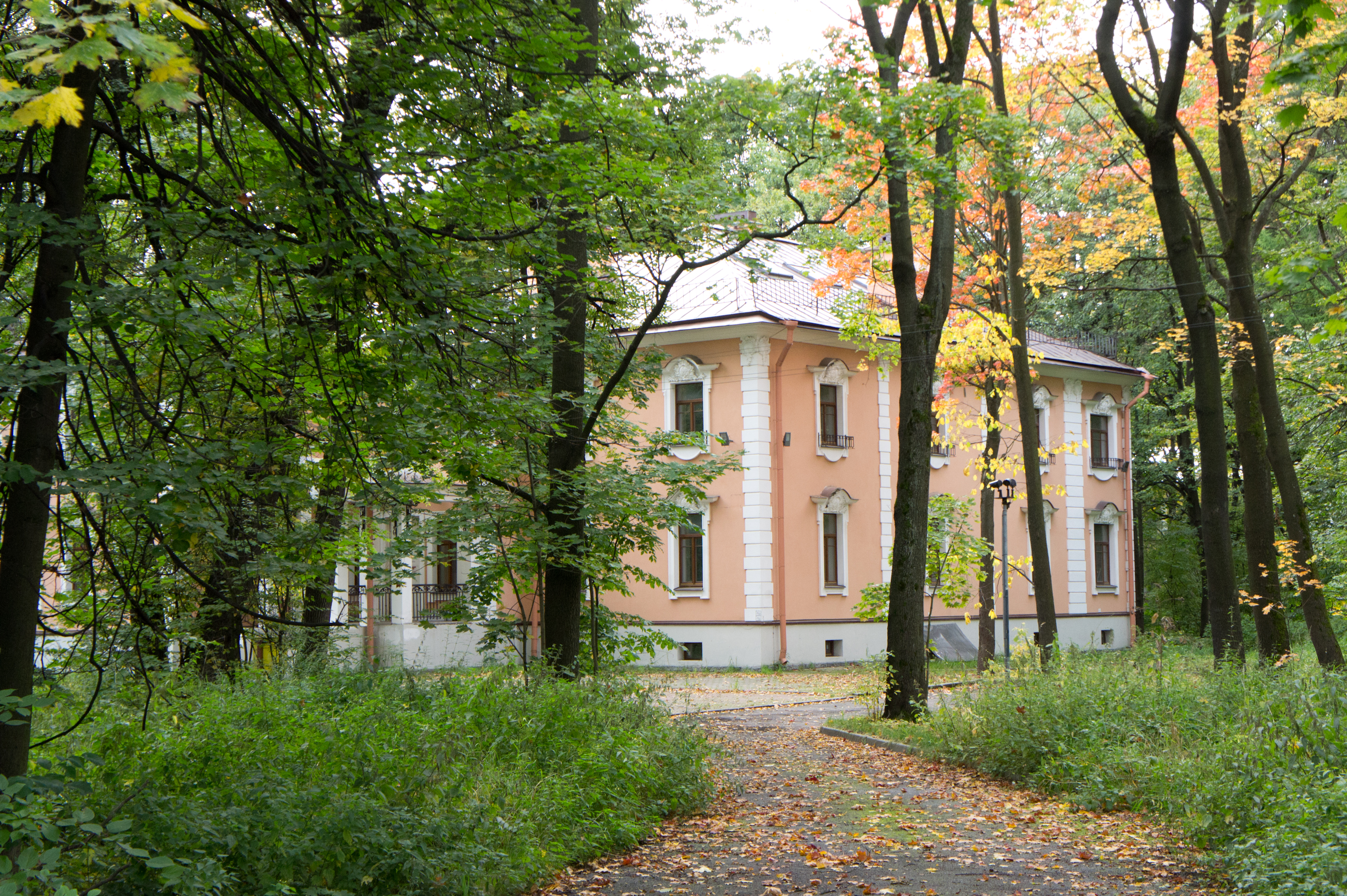 Это здание новое, не очень давно отстроенное. В данный момент выставлено на продажу. Настоящая усадьба разрушилась несколько лет назад.